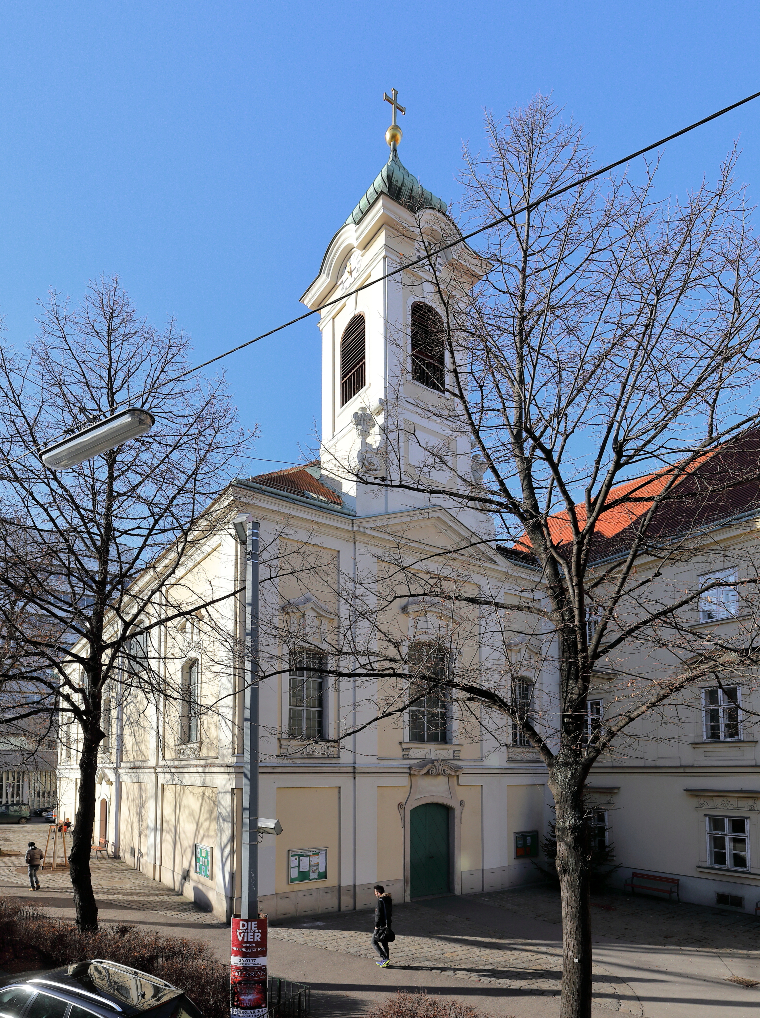 Ostansicht der röm.-kath. Filialkirche St. Thekla, auch Piaristenkirche bzw. Theklakirche bezeichnet, im 4. Wiener Bezirk Wieden.1751/52 kauften die Piaristen (ein Schulorden) das Grundstück. Im Anschluss wurde darauf ein Ordenshaus mit Kirche und angeschlossener Schule nach Plänen von Matthias Gerl errichtet. Die Kirchweihe erfolgte am 26. September 1756 und als Kirchenpatronin fungierte die hl. Thekla.